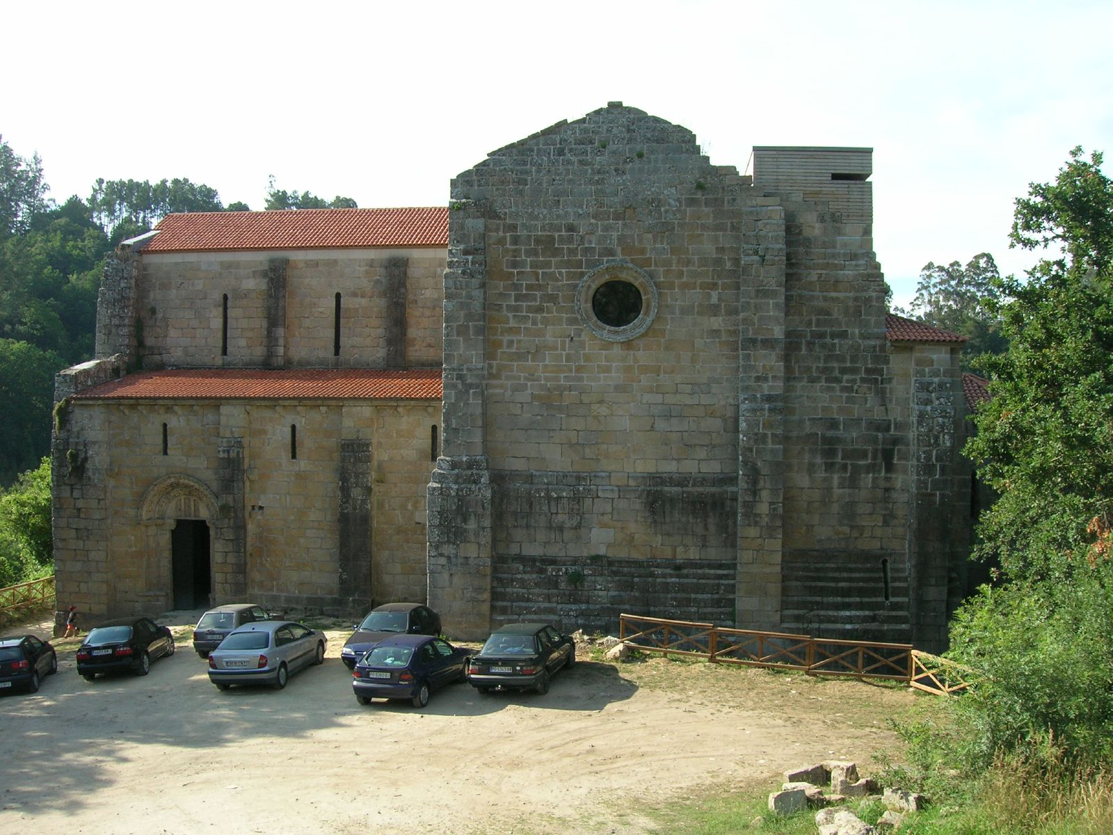 Mosteiro de San Lourenzo de Carboeiro, Silleda, Galicia - Spain